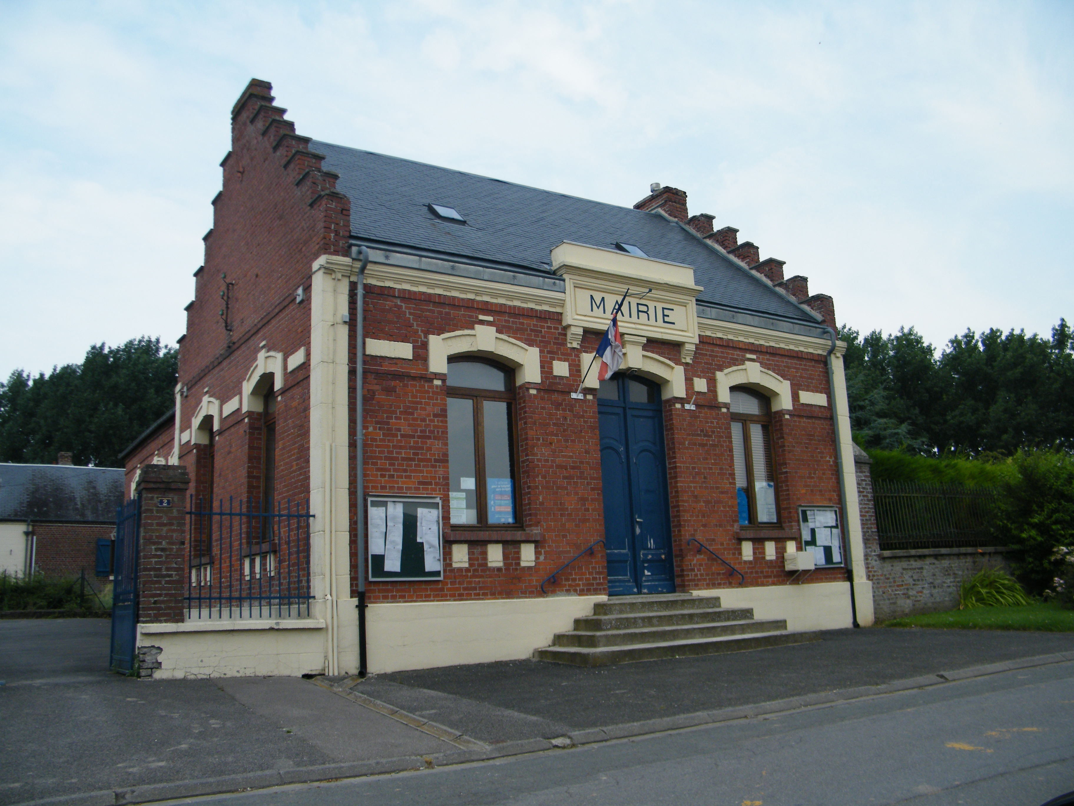 mairie.